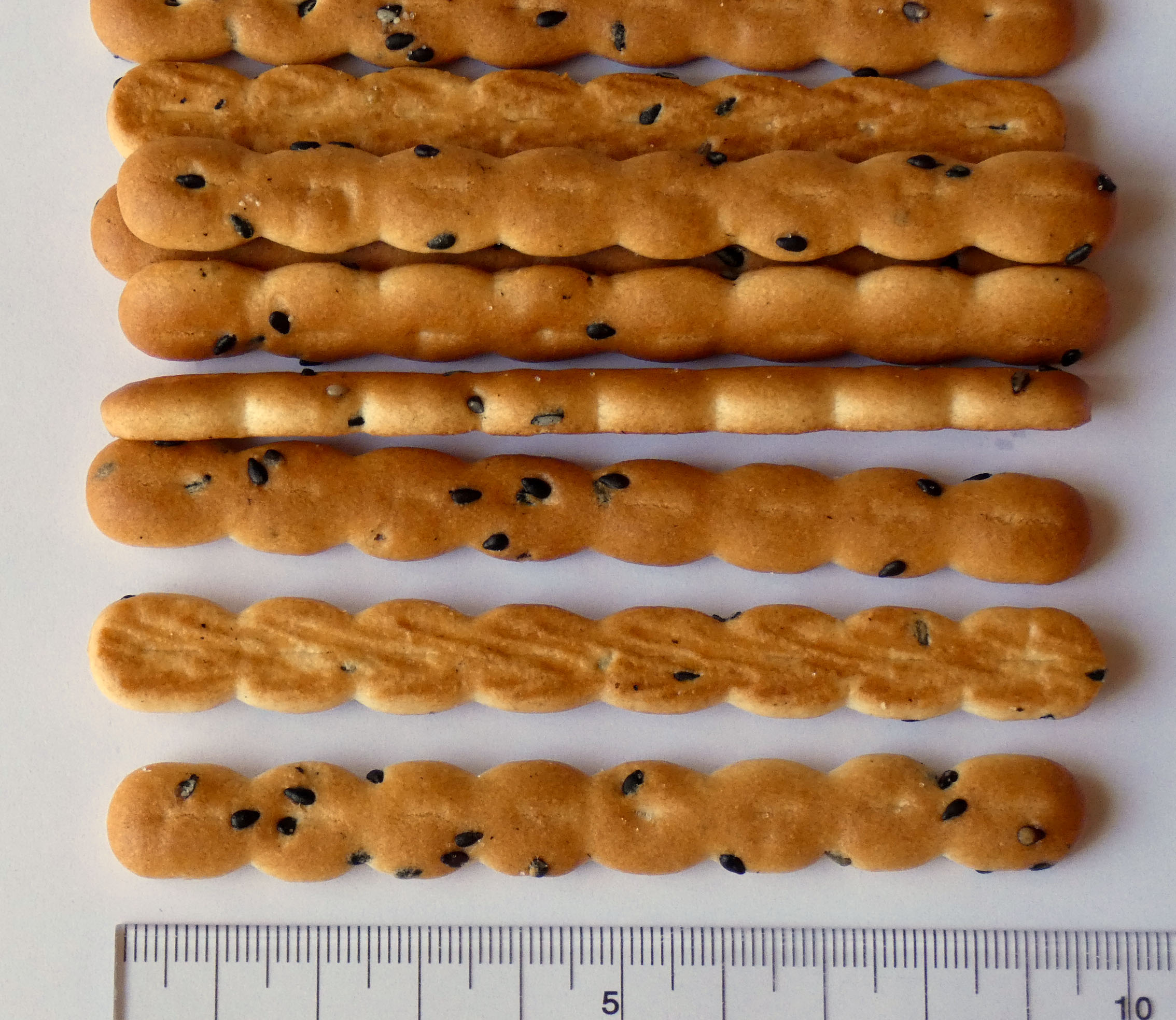 ギンビスのアスパラガスビスケット